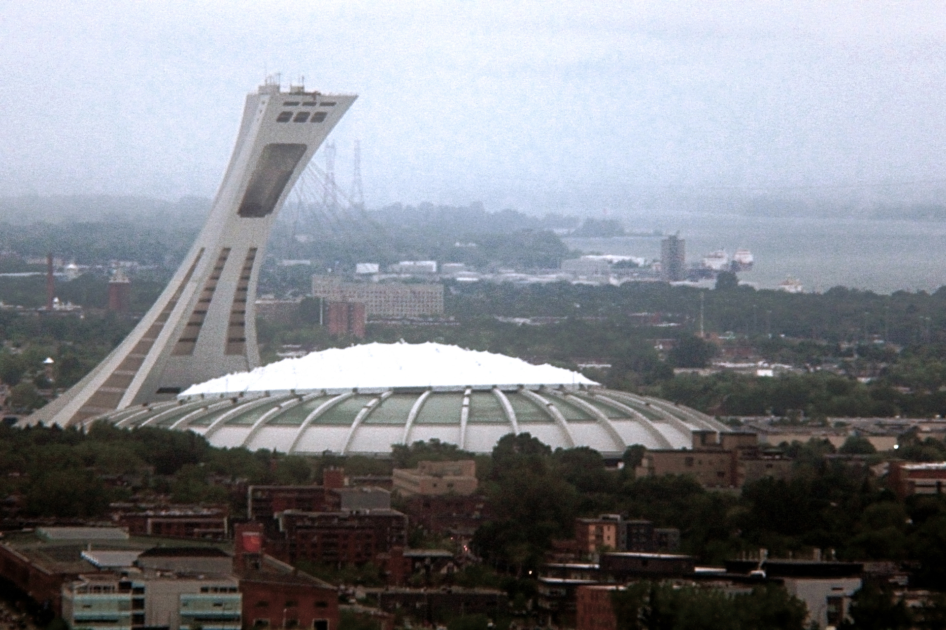 Vue sur le Stade Olympique du Mont-Royal